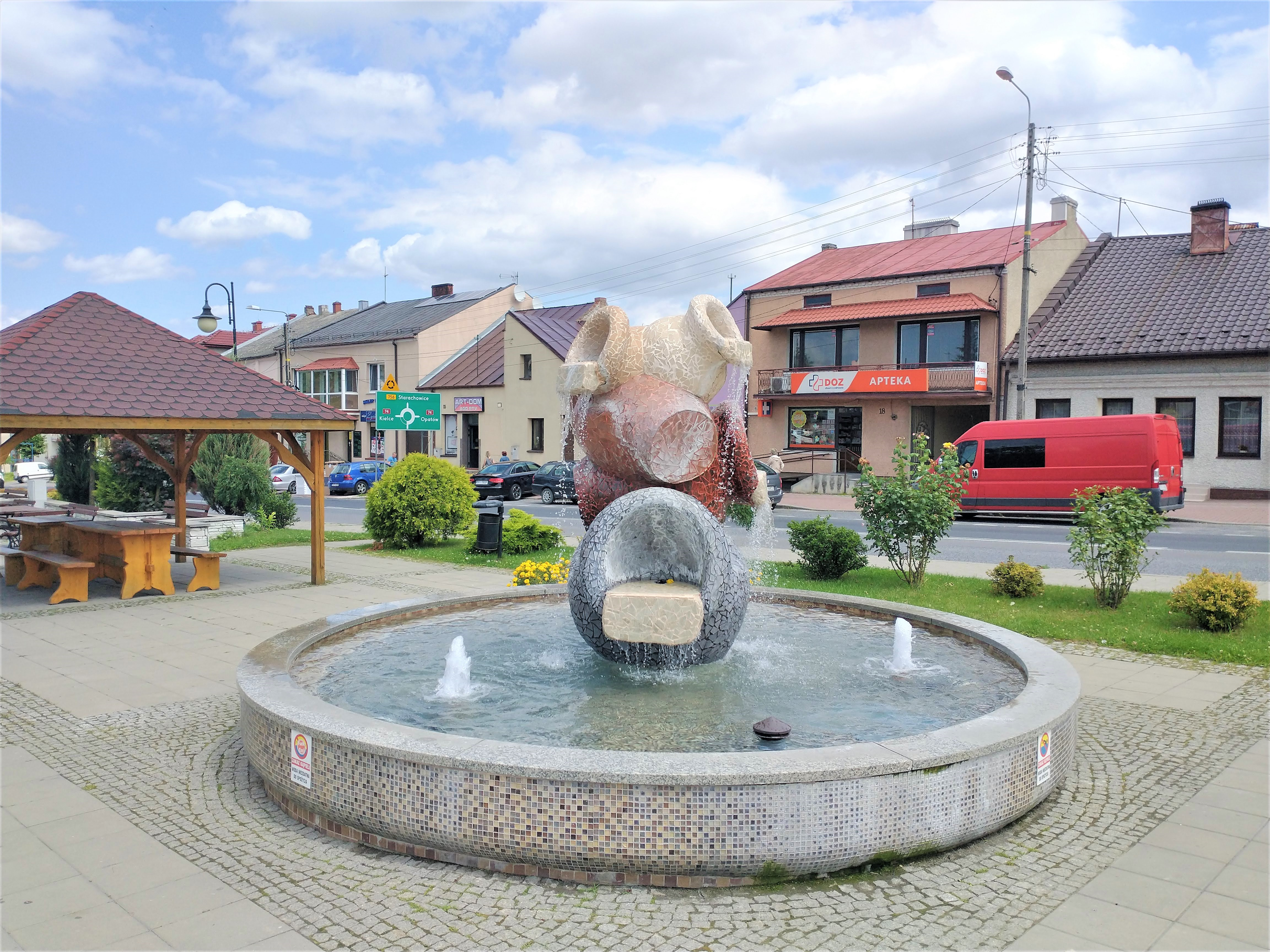 Rynek w Łagowie (świętokrzyskim).